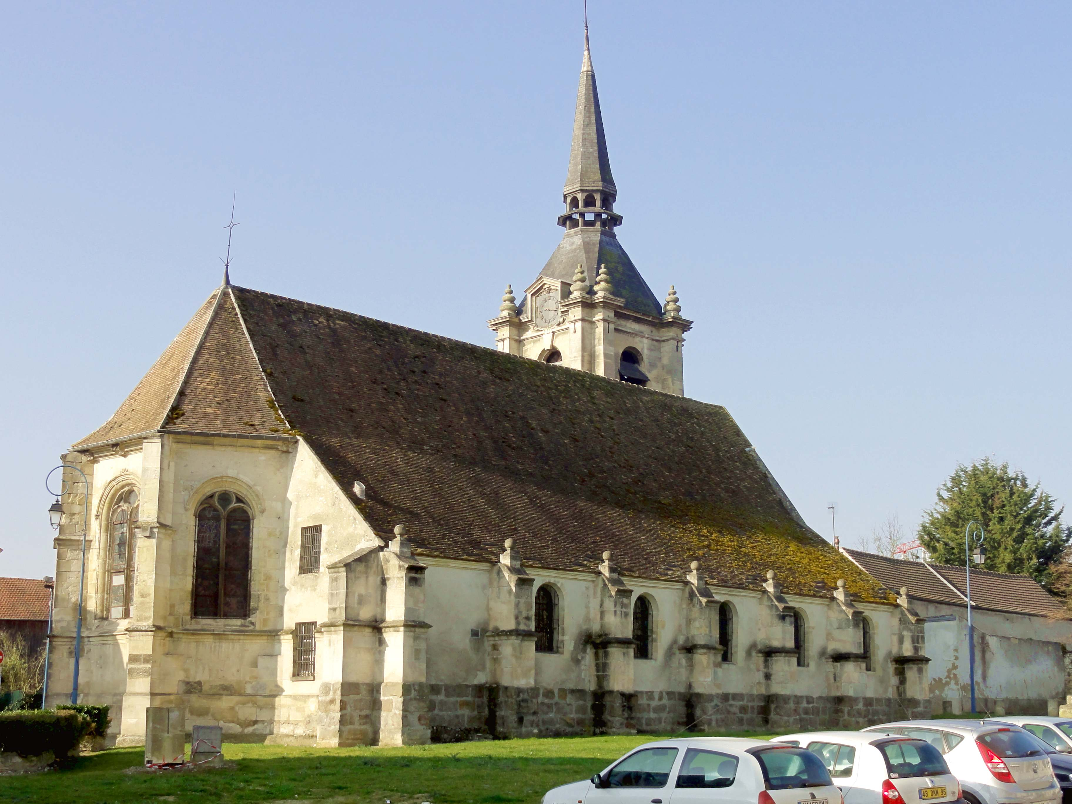 Voir titre.